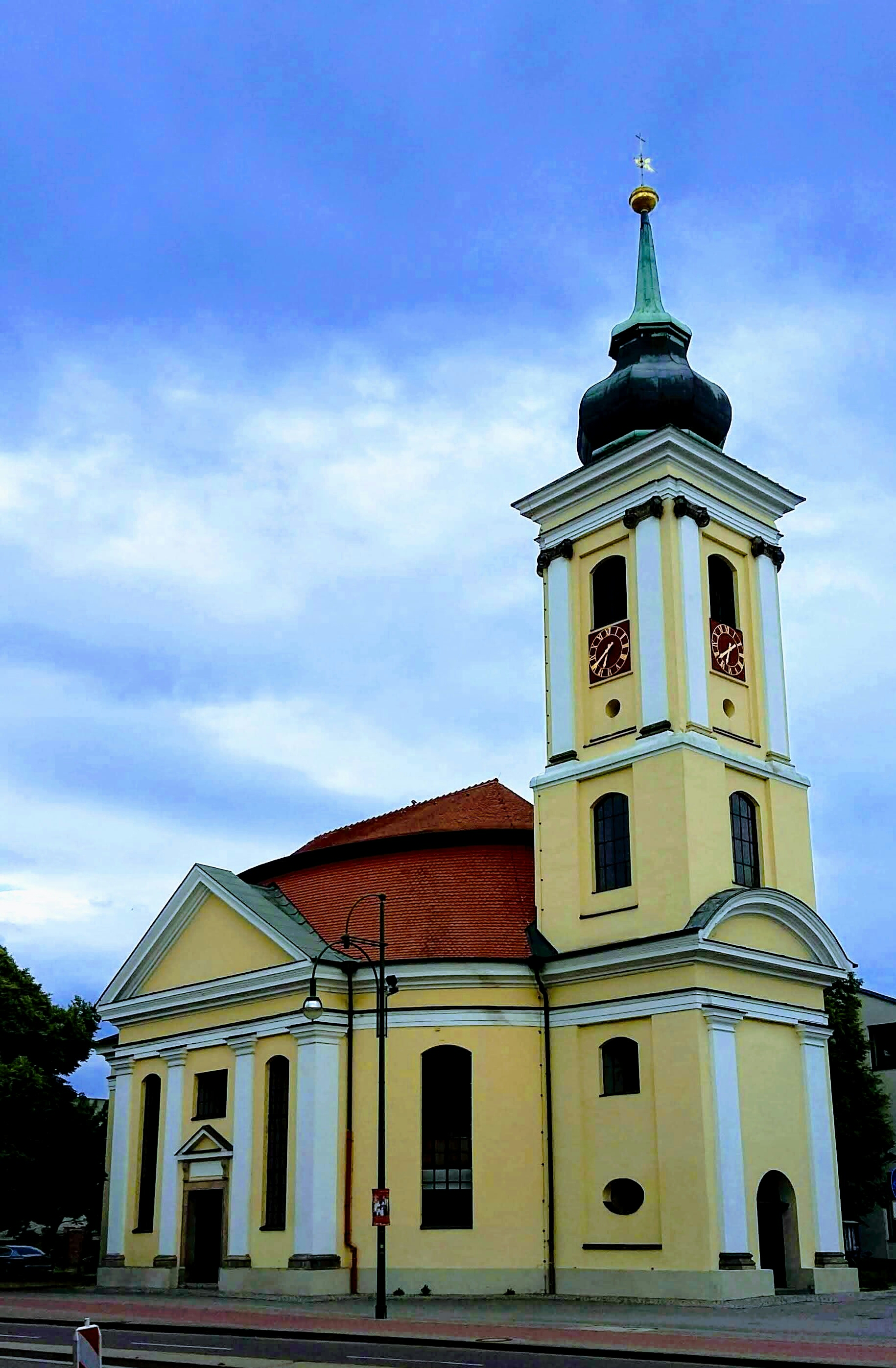 Georgenkirche